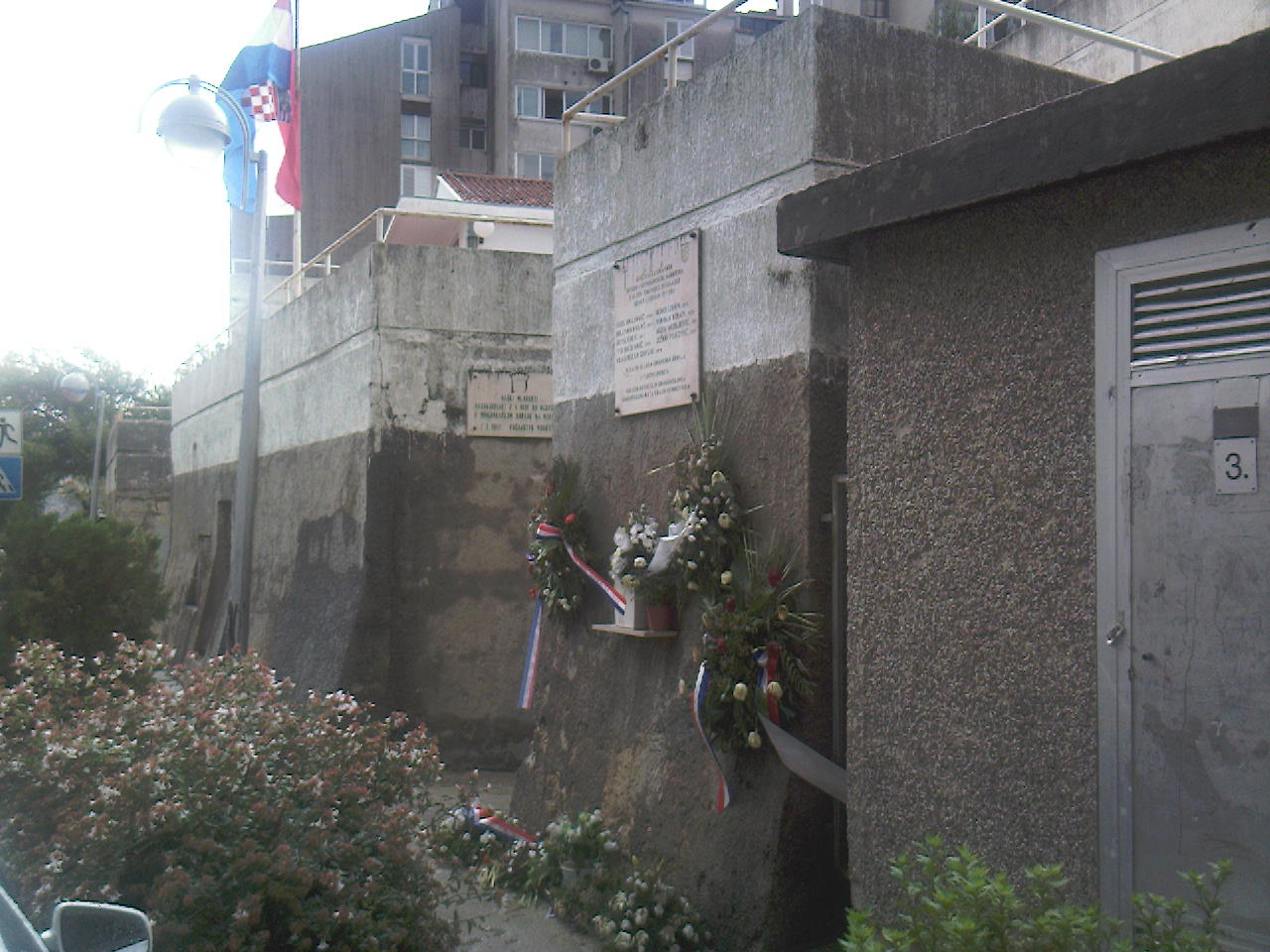 Mjesto pogibije devetorice civila i branitelja Dubrovnika